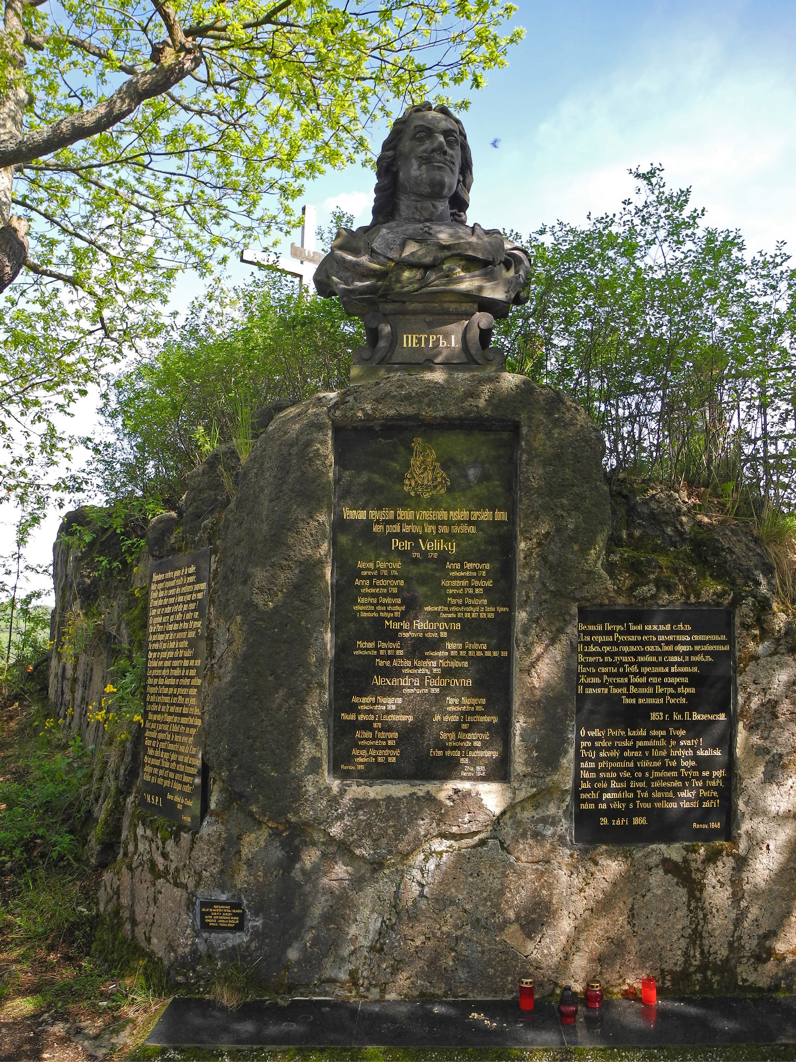 Aussichtspunkt Petershöhe oberhalb von Karlsbad (Karlovy Vary), benannt nach Zar Peter den Großen, der Karlsbad 1711 und 1712 besucht hat. Büste von Peter I. und Gedenktafeln.